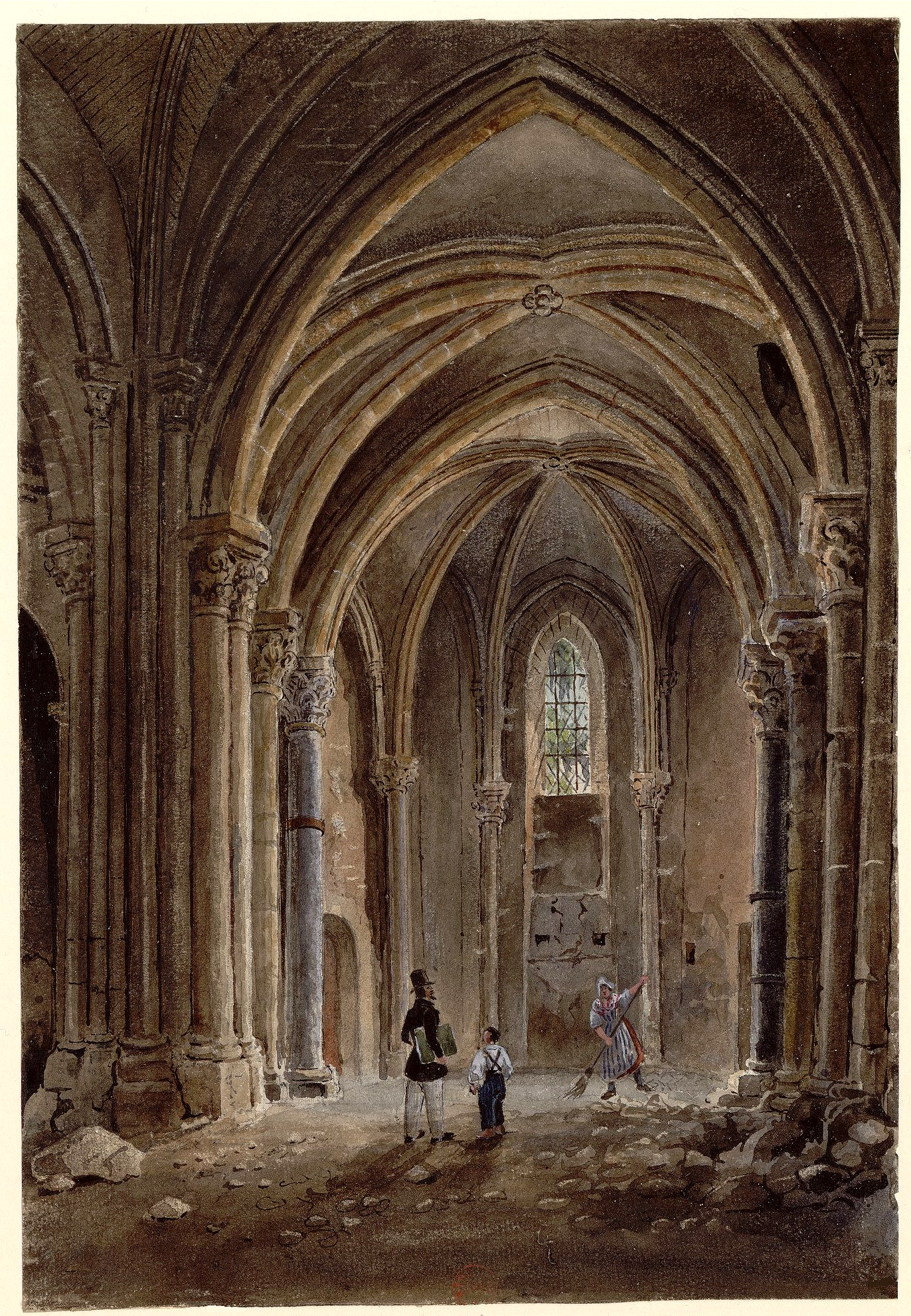 Intérieur de l'église au XIXe siècle.